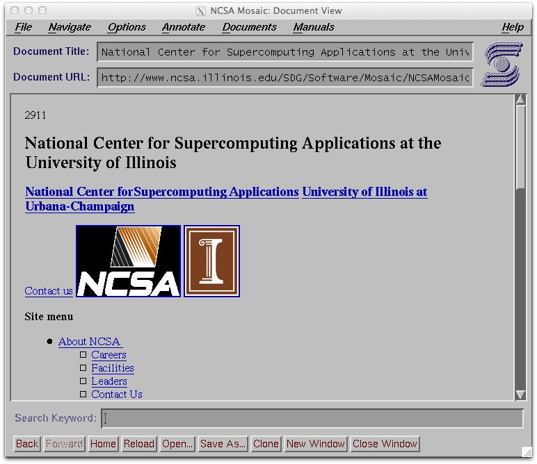 Screenshot des Browsers NCSA Mosaic